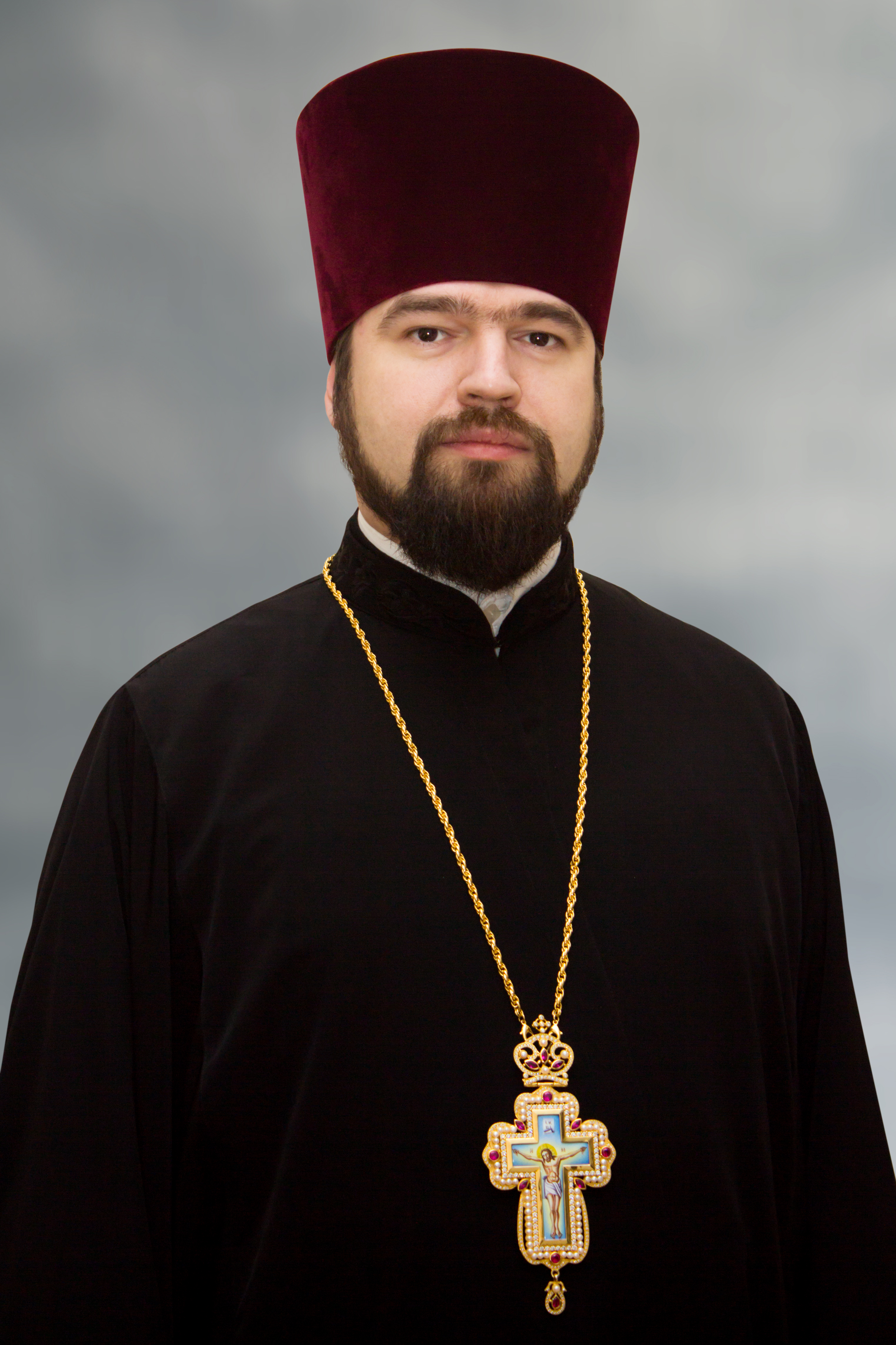 офіційний портрет протоієрея Олександра Трофимлюка